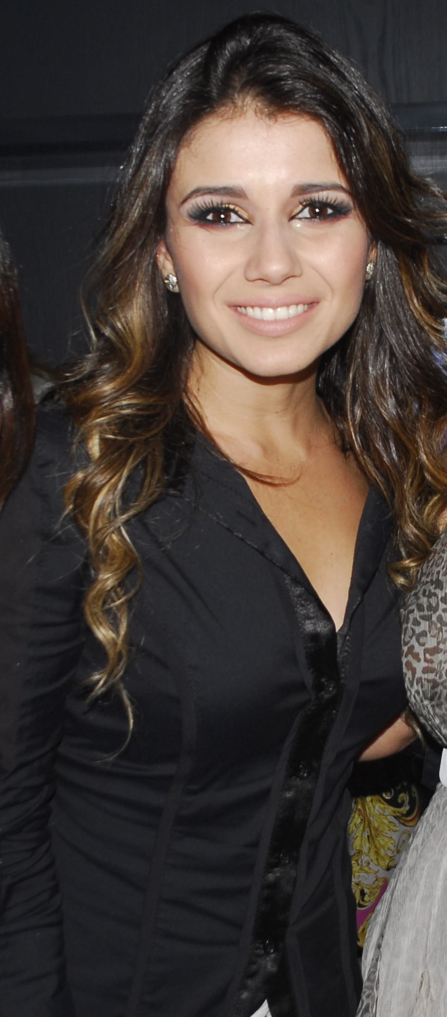 Cantora brasileira Paula Fernandes em 2012.